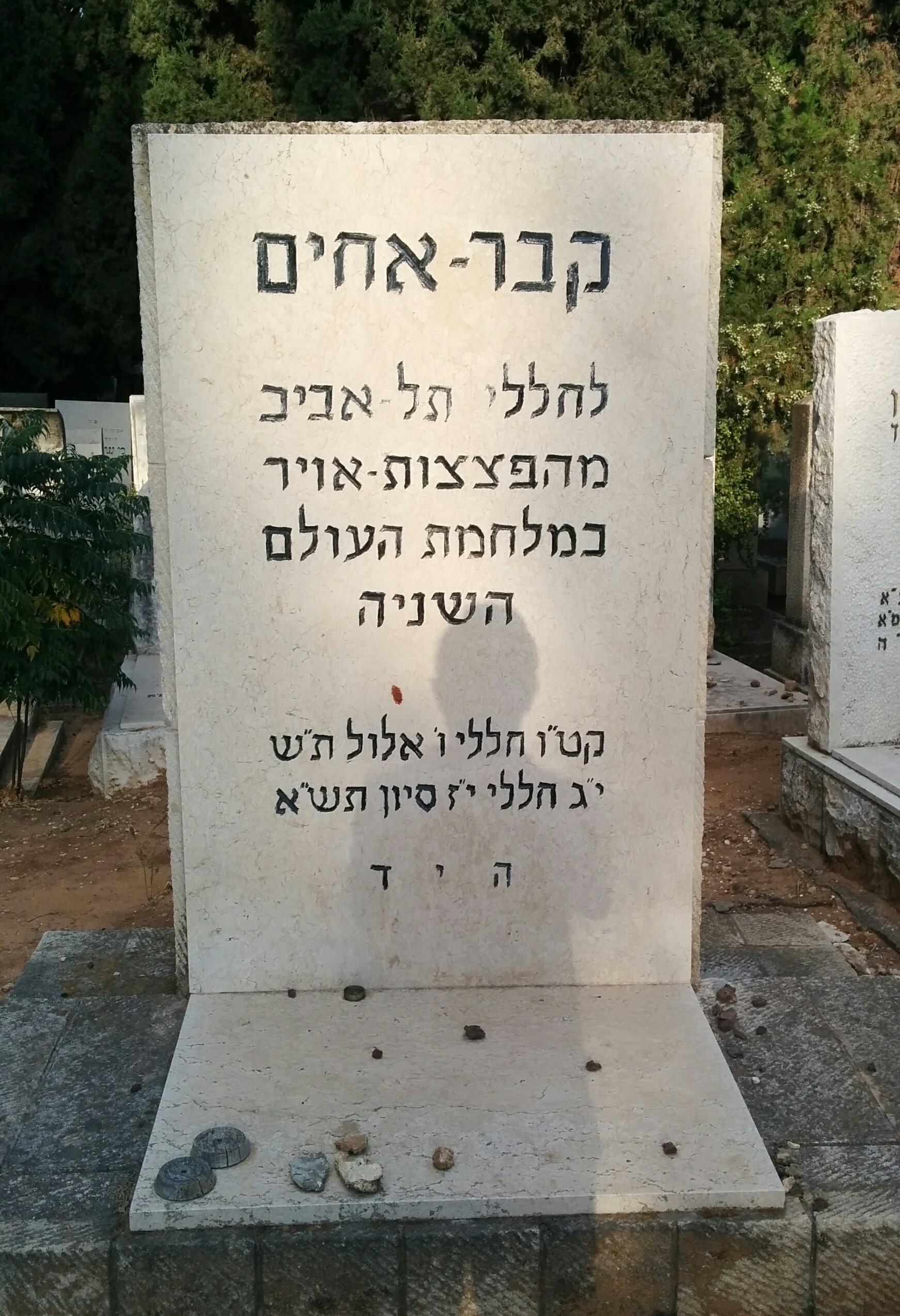 מצבה משותפת בקבר האחים של הפצצת חיל האוויר האיטלקי על ת"א, הנמצאת בבית העלמין נחלת יצחק בגבעתיים